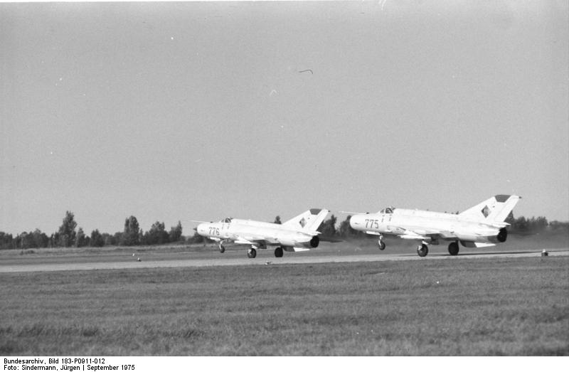 ADN-ZB/Sindermann/11.9.1975/DDR: Jagdflieger der NVA/Start zu einem Übungsflug. Mit hohen Leistungen garantieren die Angehörigen des Jagdfliegergeschwaders "Heinrich Rauh" den sicheren des Luftraumes der DDR.